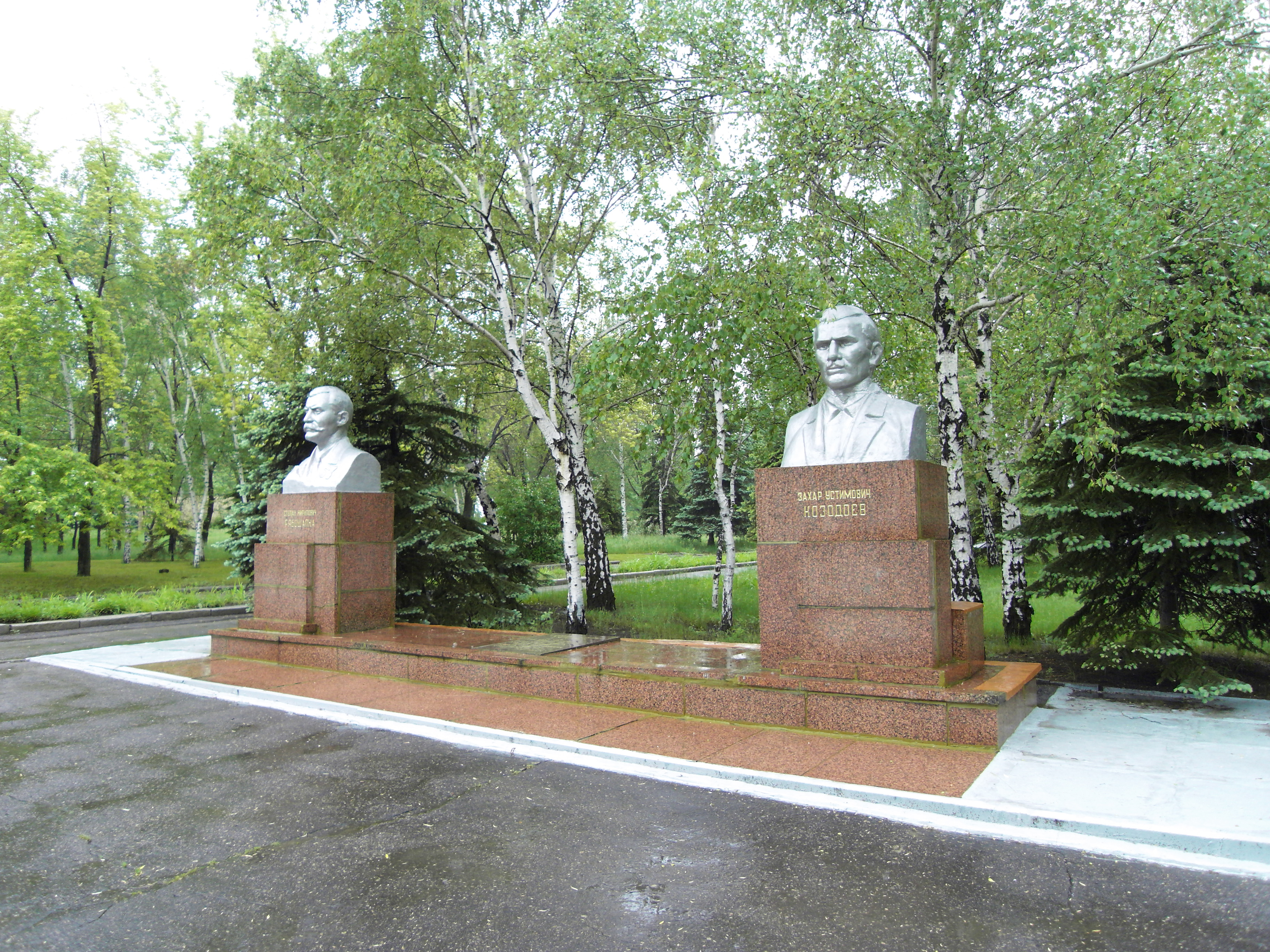 Пам'ятник героям перших п'ятирічок Рябошапці та Козодоєву